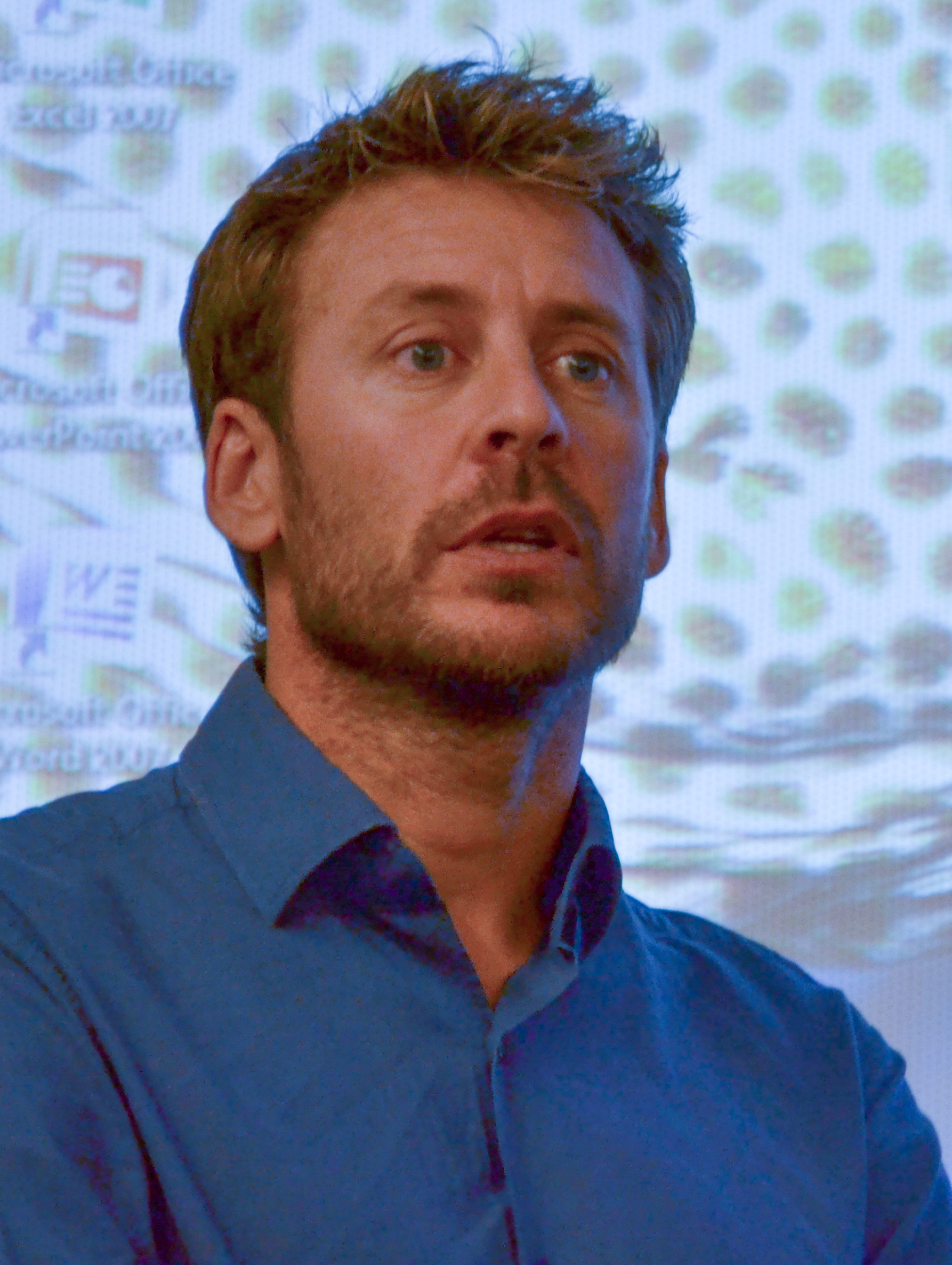 Laurent Ballesta en 2015 à Montpellier.